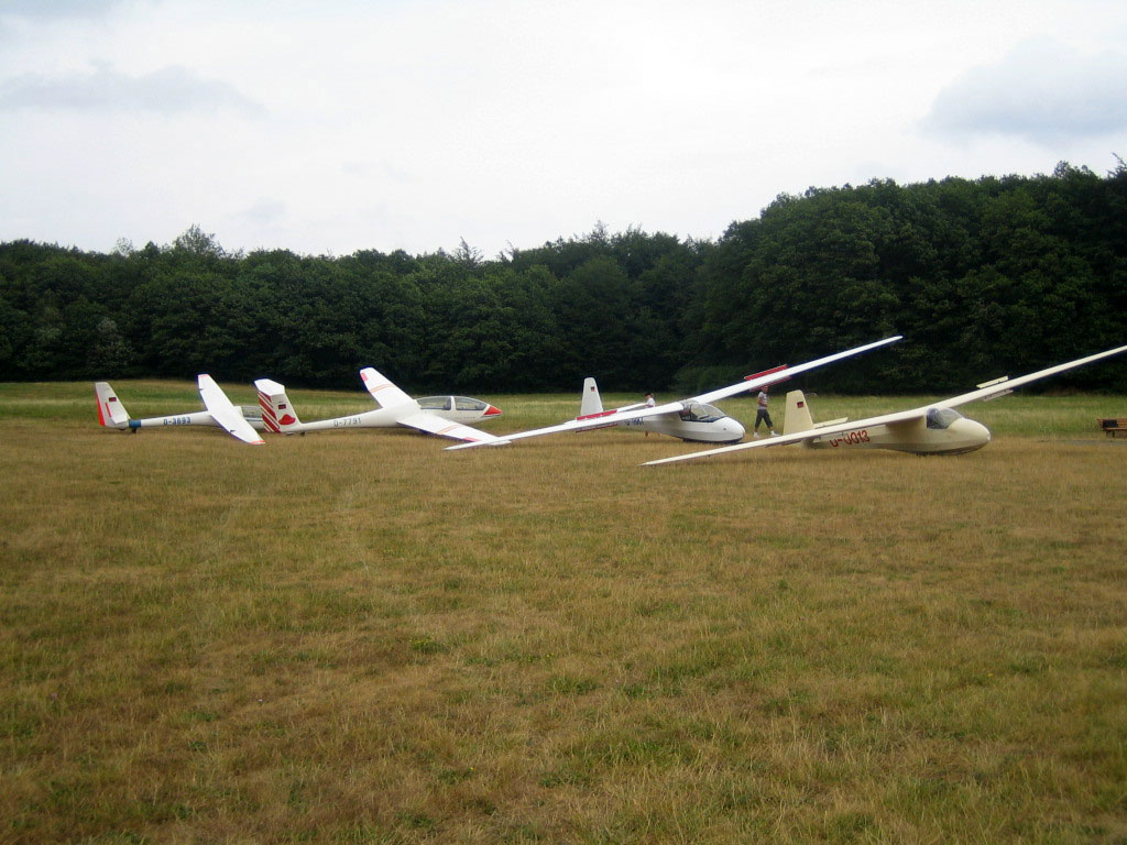 Flugzeuge am Start auf dem Flugplatz Eßweiler. Bild: Marco Creutz